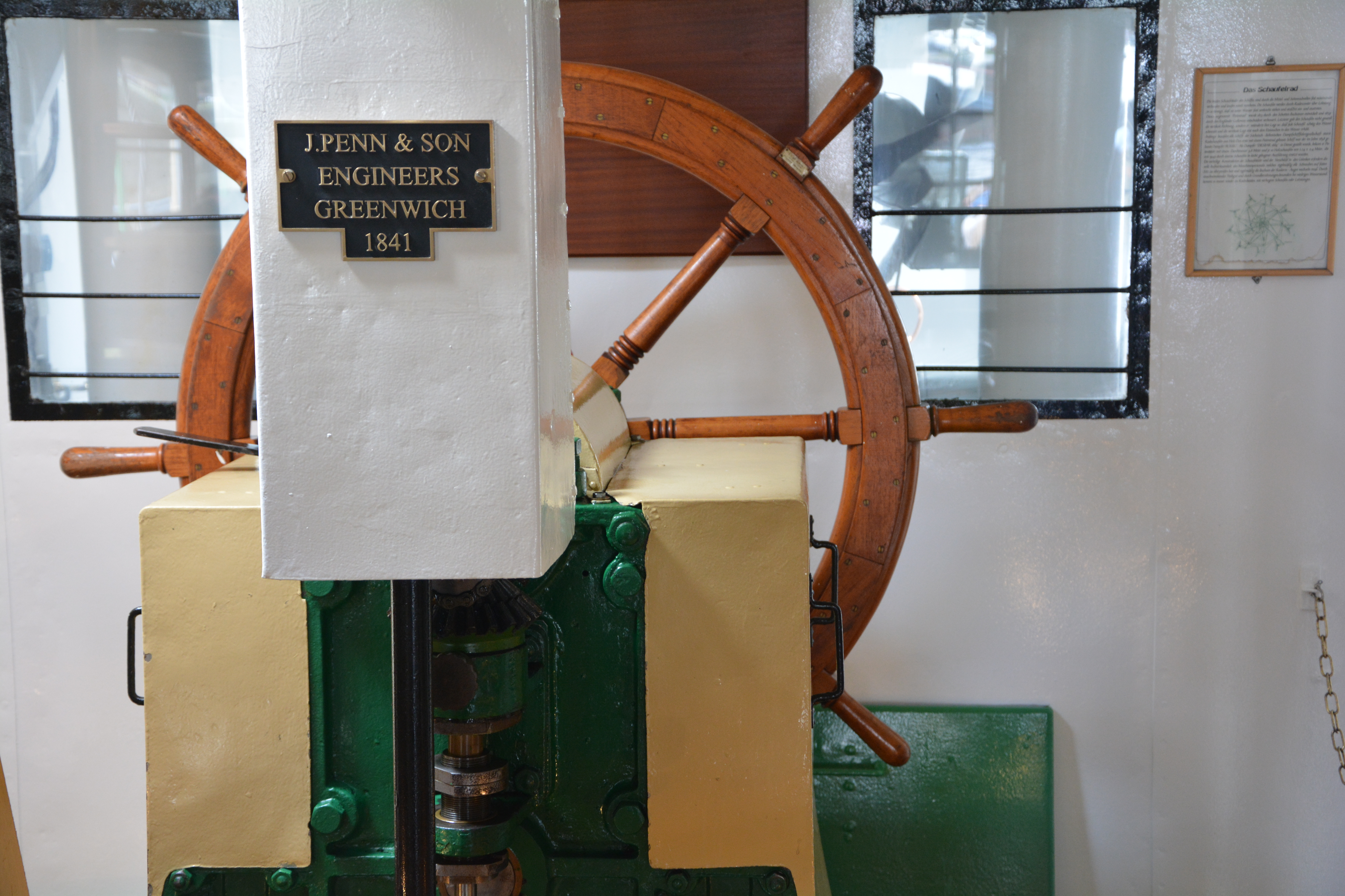 Dresden, Personendampfer Diesbar, Probefahrt am 24. September 2016 nach dem Brandereignis